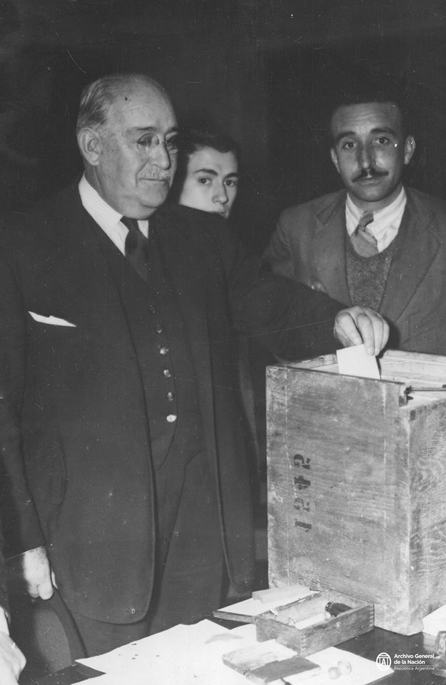 Justo emite su voto en las elecciones fraudulentas de 1931. AGN_DDF/Inventario: 41486.